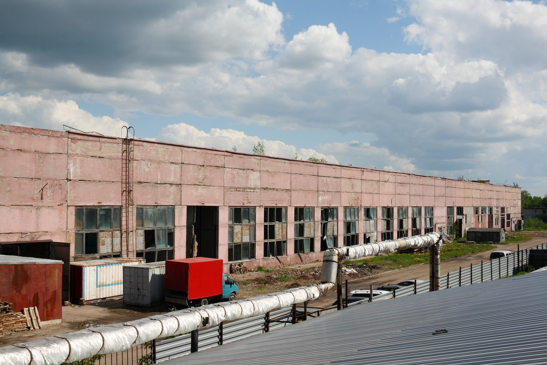 Здания ГПЗ-5 на Ивановского, Томск